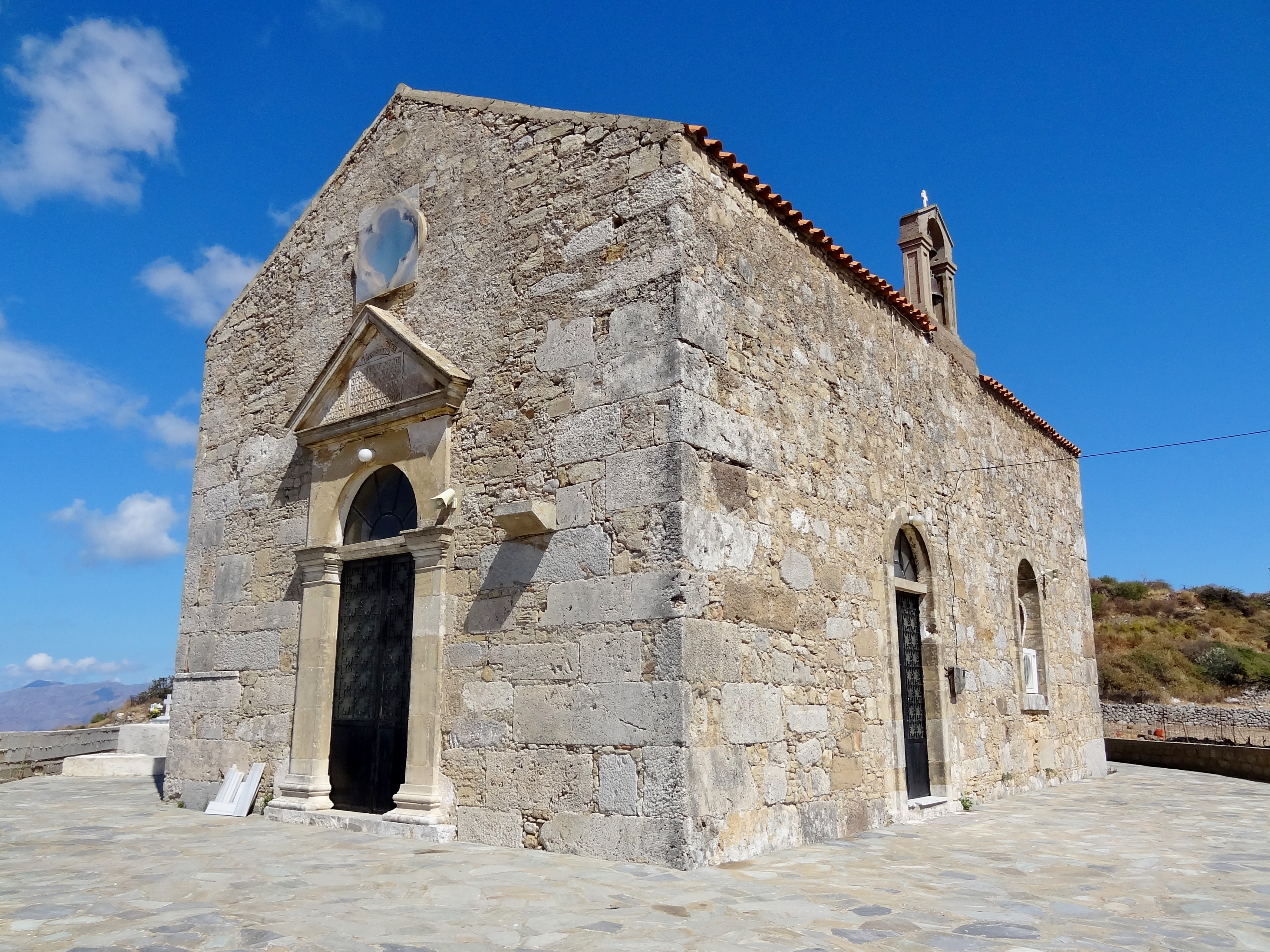 Kirche der 99 Heiligen Väter (Εκκλησία των 99 Αγίων Πατέρων), Gemeinde Kissamos, Regionalbezirk Chania, Kreta, Griechenland